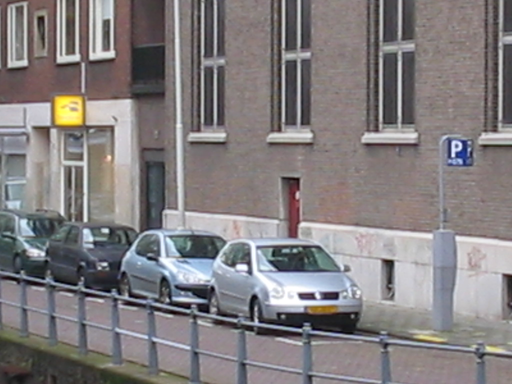 straatparkeren Rotterdam Categorie:Wikipedia:Afbeeldingen/Gebruiker:Michiel1972